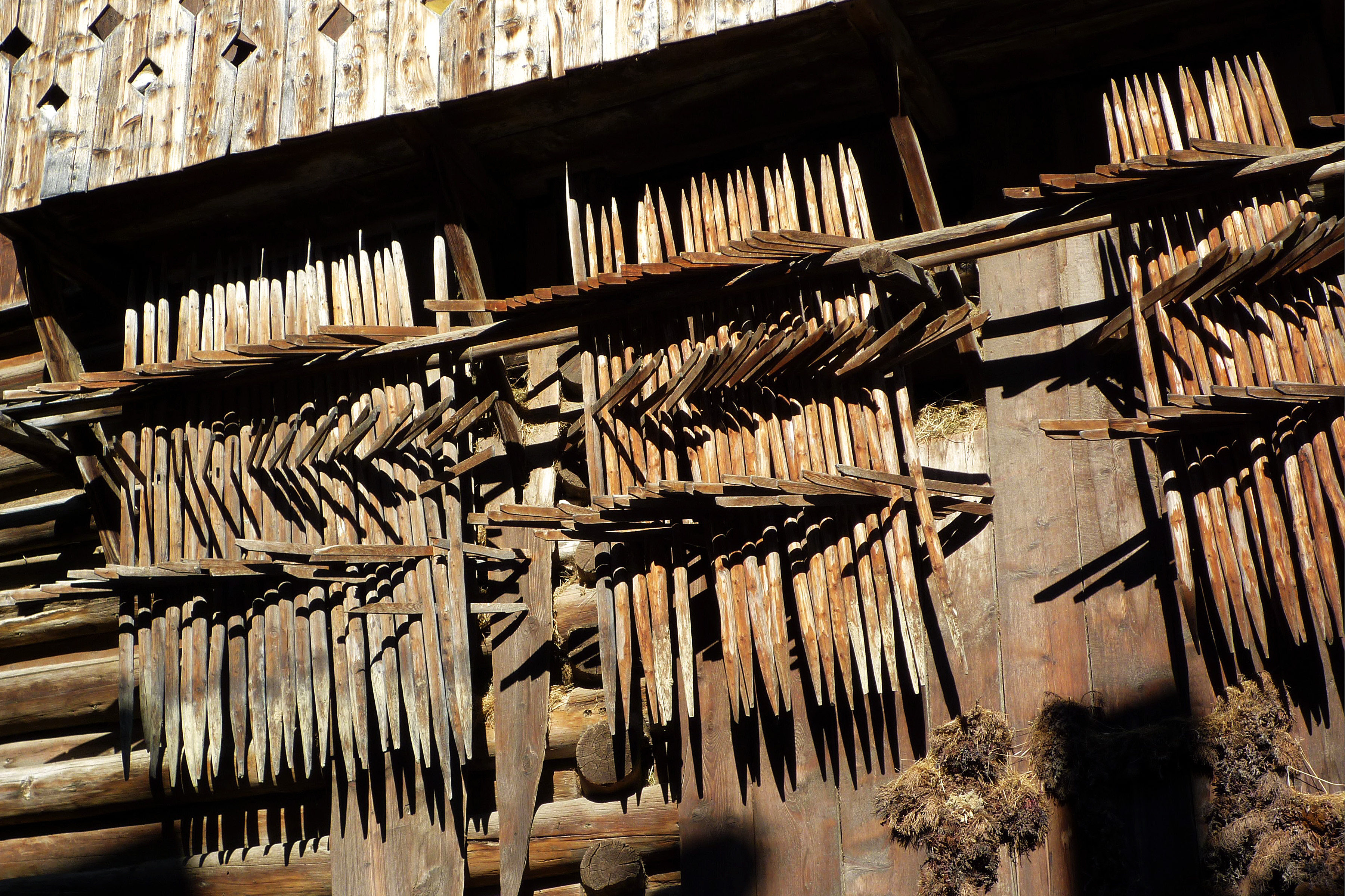 Fiss - Heuhalter zum Trocknen